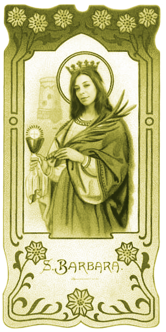 santa barbara da cagliari